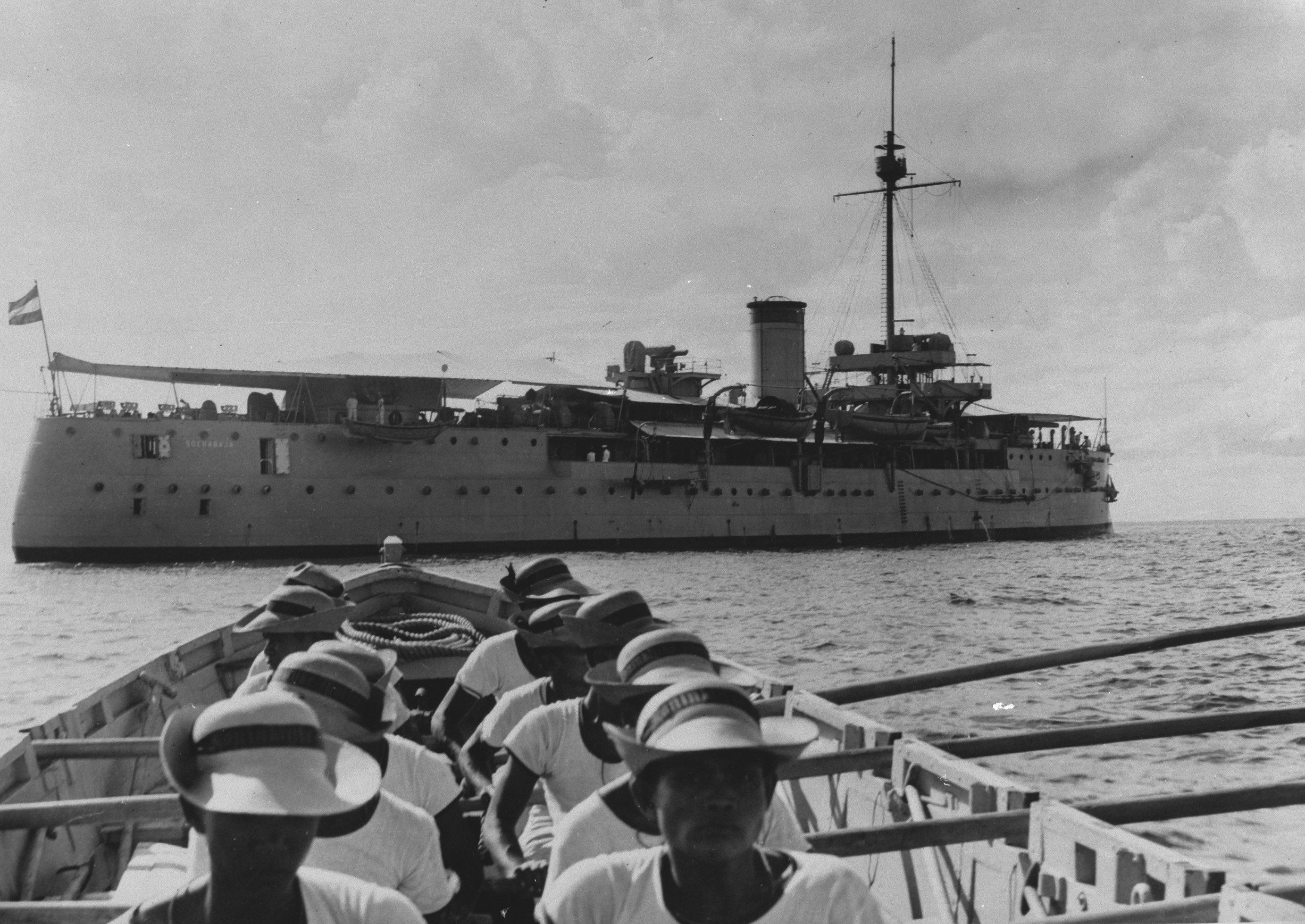 Collectie / Archief : Fotocollectie Anefo Reportage / Serie : NAVY [Navy] Anefo Londen serie Beschrijving : Opleidingsschip Hr. Ms. "Soerabaja" Annotatie : Repronegatief Is de vml. pantserschip "Zeven Provinciën". Na de muiterij in 1933 is het schip in 1936 hernoemd in "Soerabaja" en is op 18 februari 1942 bij een Japans bombardement tot zindken gebracht Datum : {1936-1942} Locatie : Indonesië, Nederladns-Indië Trefwoorden : marine, oorlogsschepen, tweede wereldoorlog Fotograaf : Onbekend / Publiek Domein Auteursrechthebbende : Nationaal Archief Materiaalsoort : Negatief (zwart/wit) Nummer archiefinventaris : bekijk toegang 2.24.01.04 Bestanddeelnummer : 935-0349